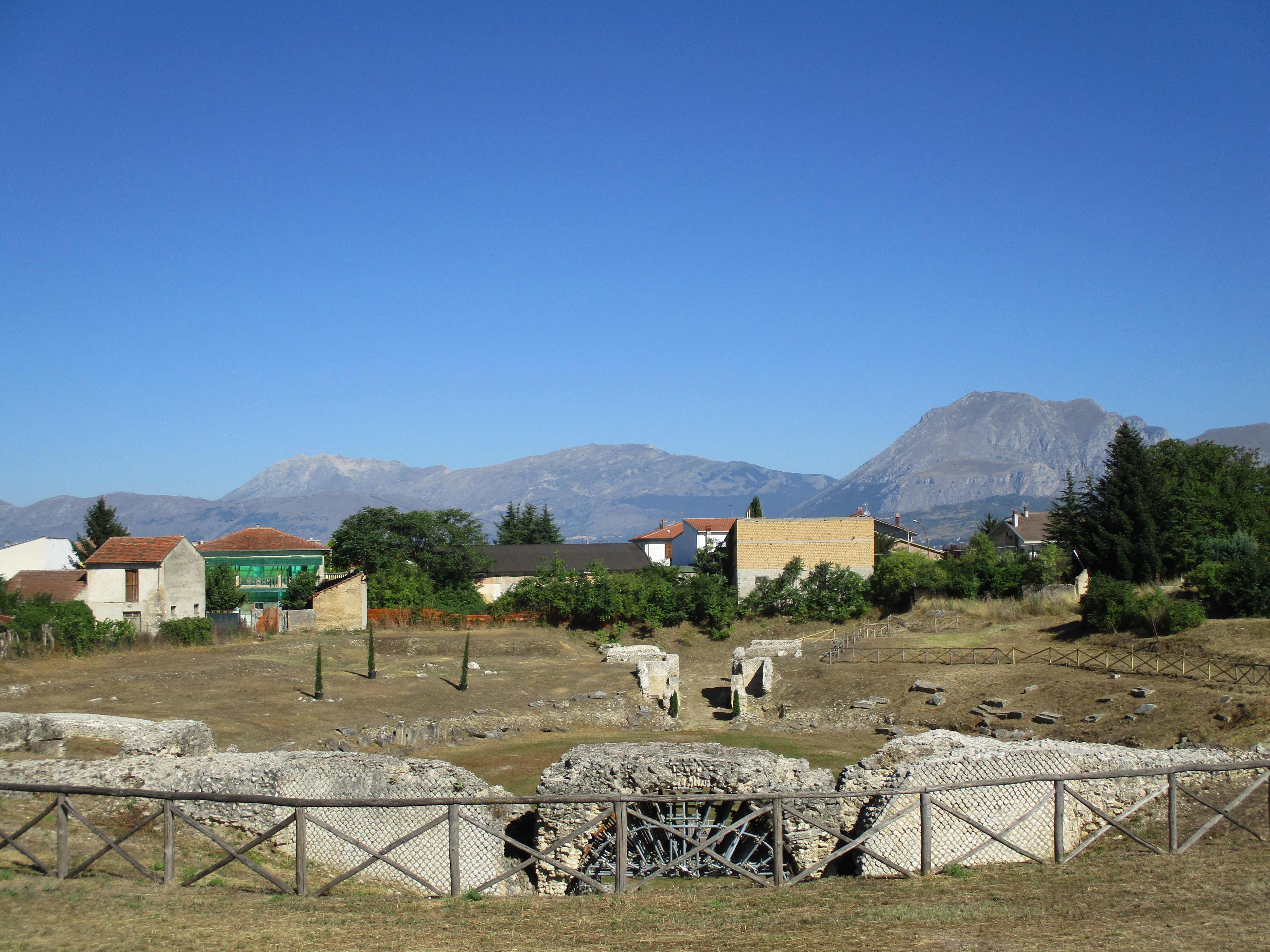 Anfiteatro in Marruvium